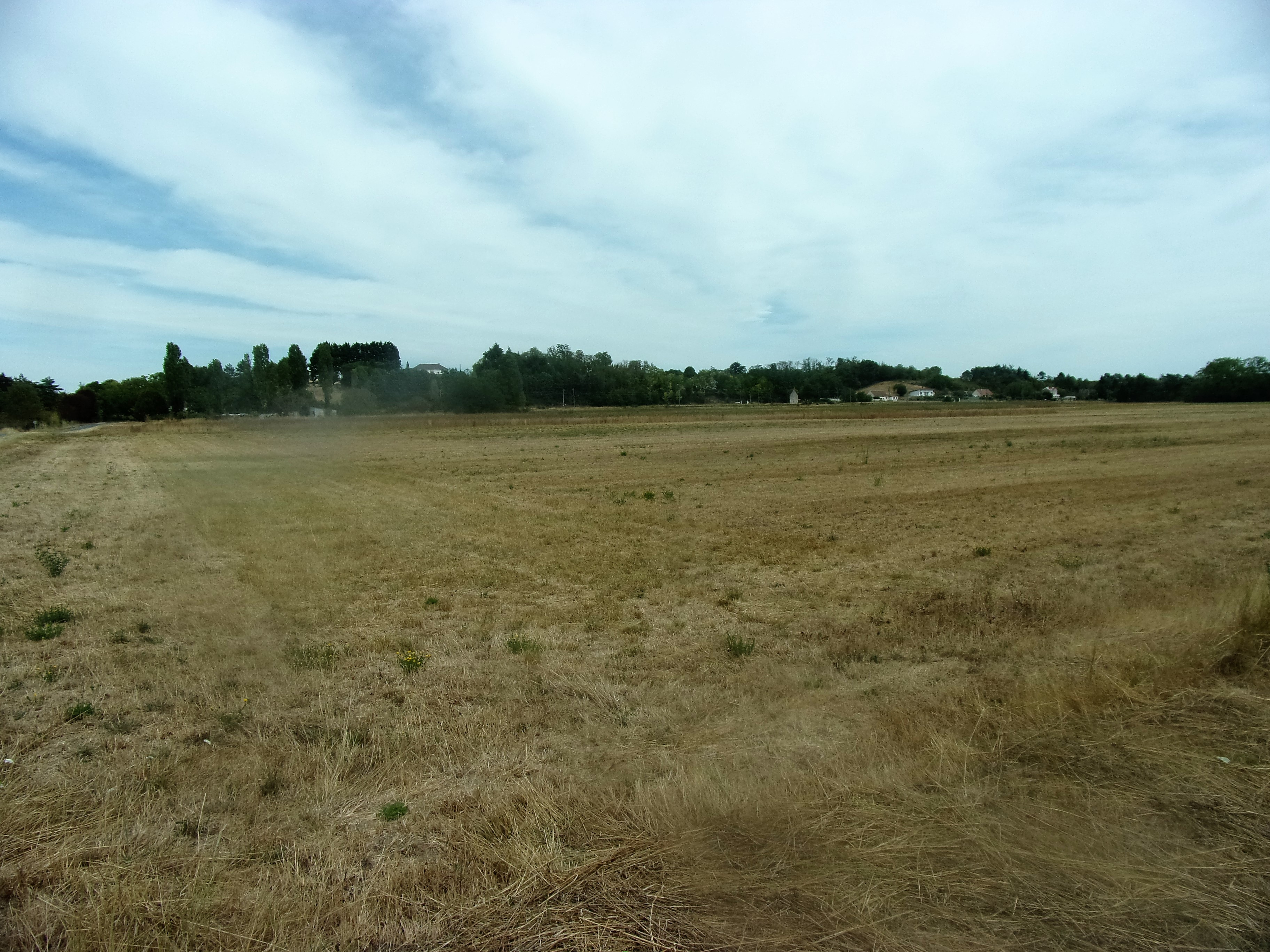 Le site du Moulin du Ru à Monthou-sur-Cher, partie de l'antique Tasciaca